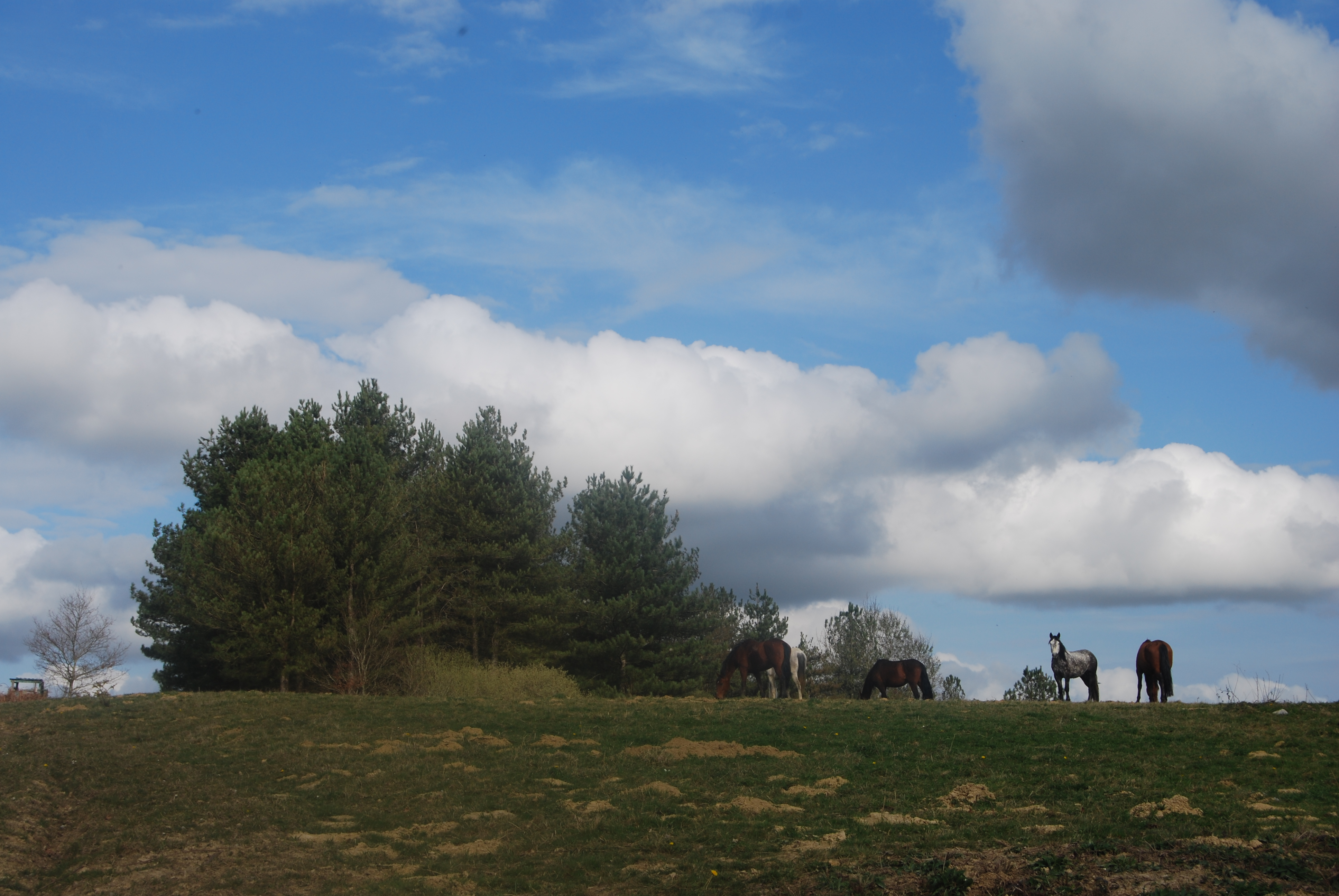 Chevaux sur le tuc du Bouc ou tuc d'Anguely, Urt.